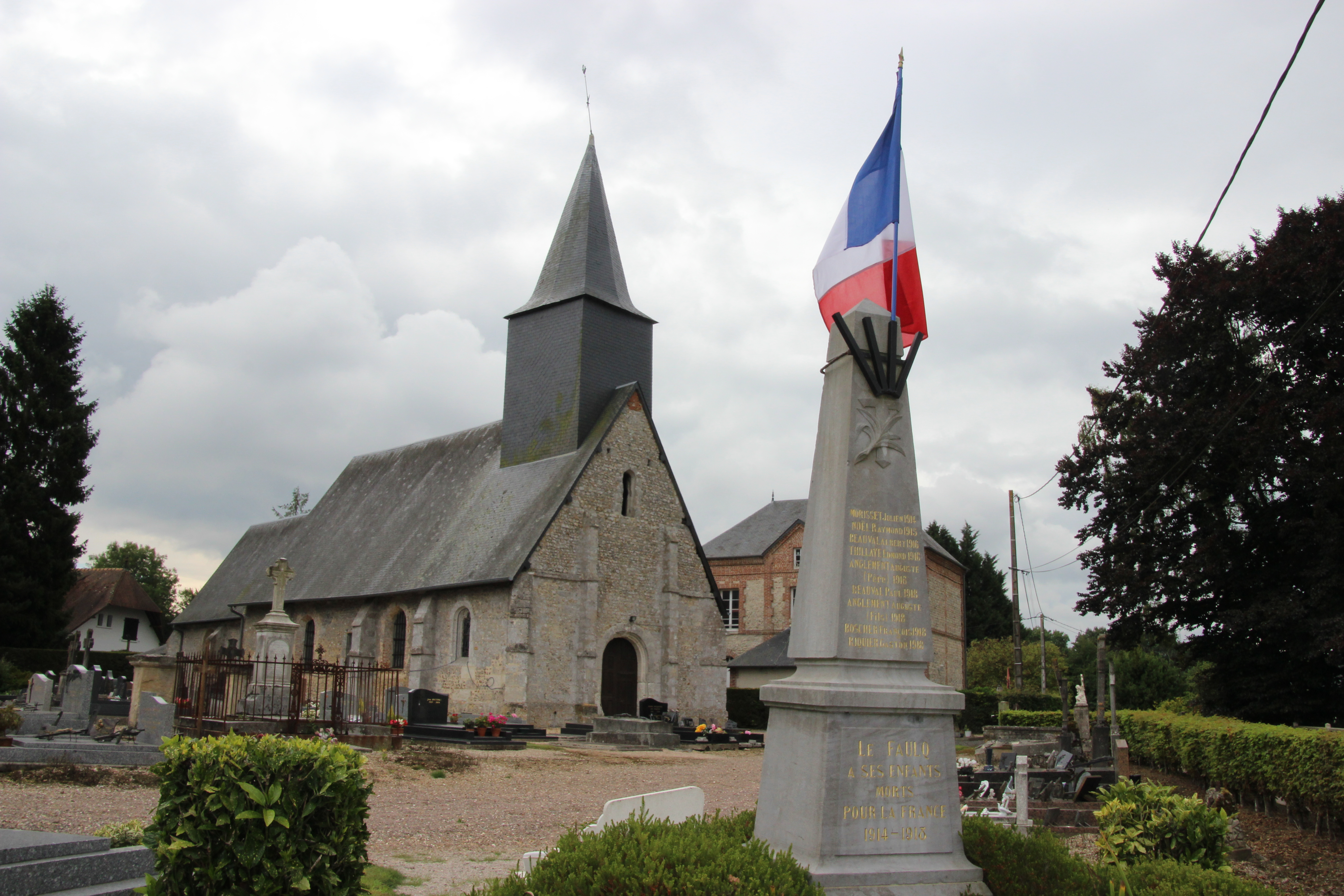 église et monument aux morts Le Faulq